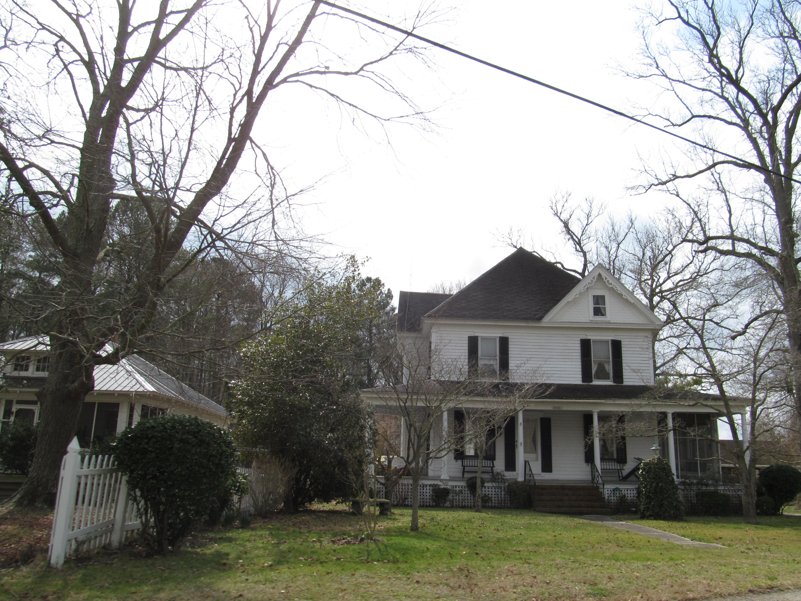 Bloxom, Virginia